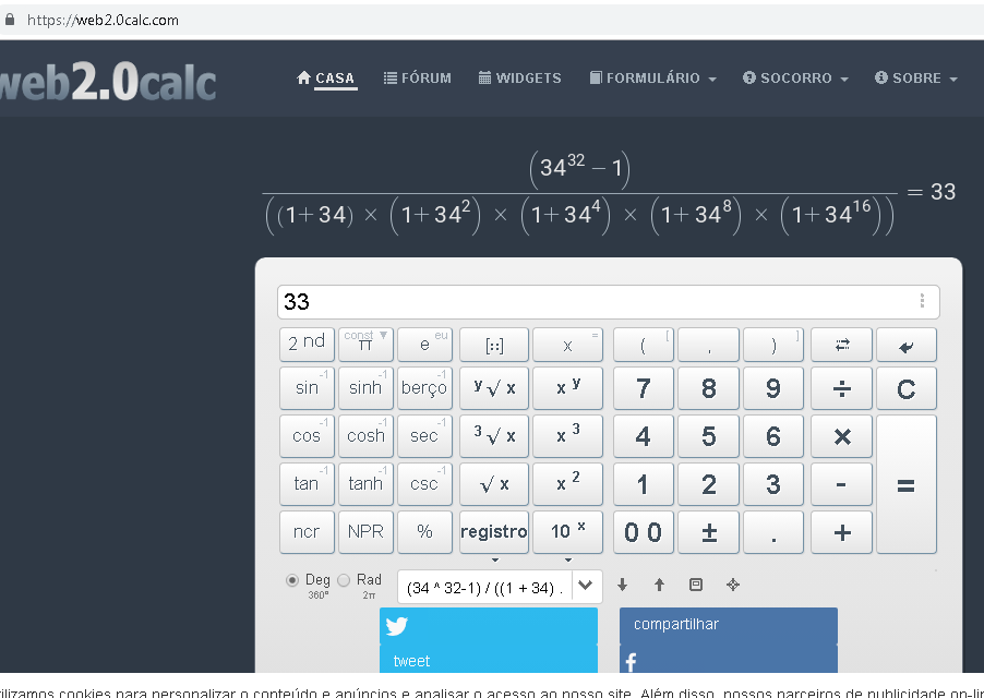 Os cálculos foi feita através do Site Calculadora cientifica da Web 2.0, link do site